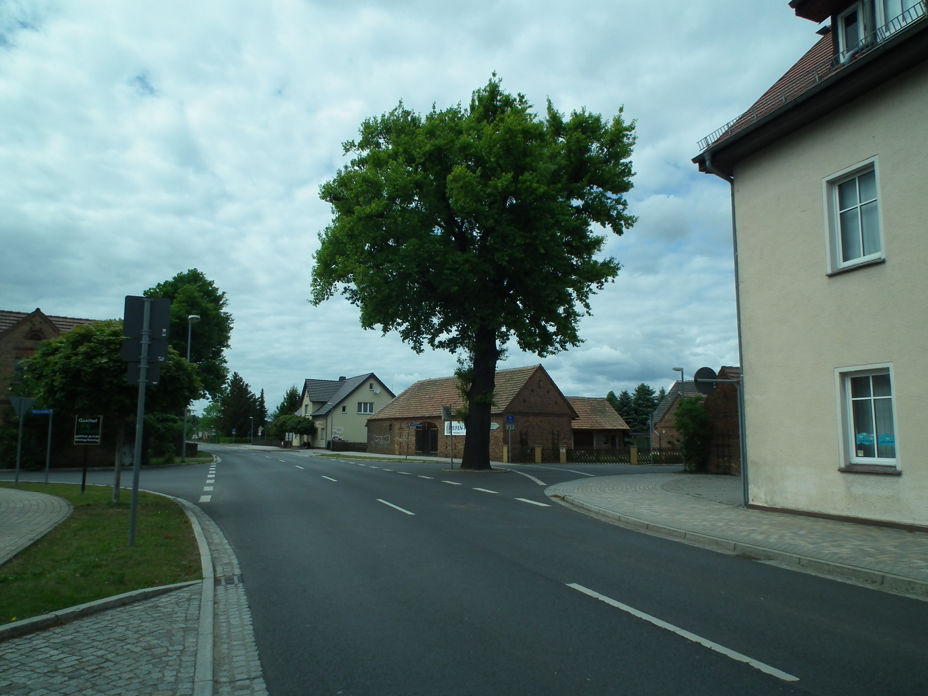 Weißkeißel